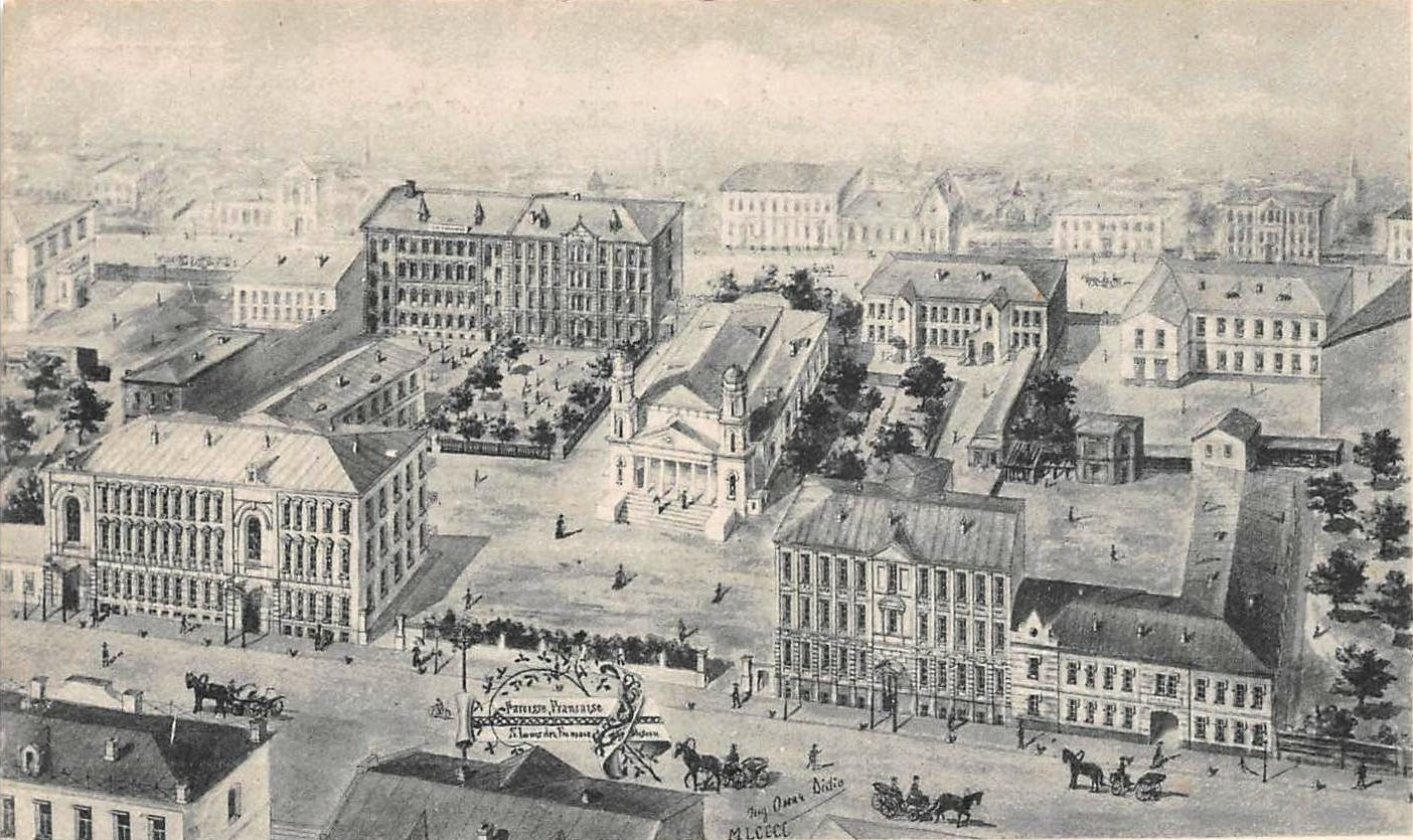 О. Ф. Дидио. Издание фототипии - Отто Ренар.